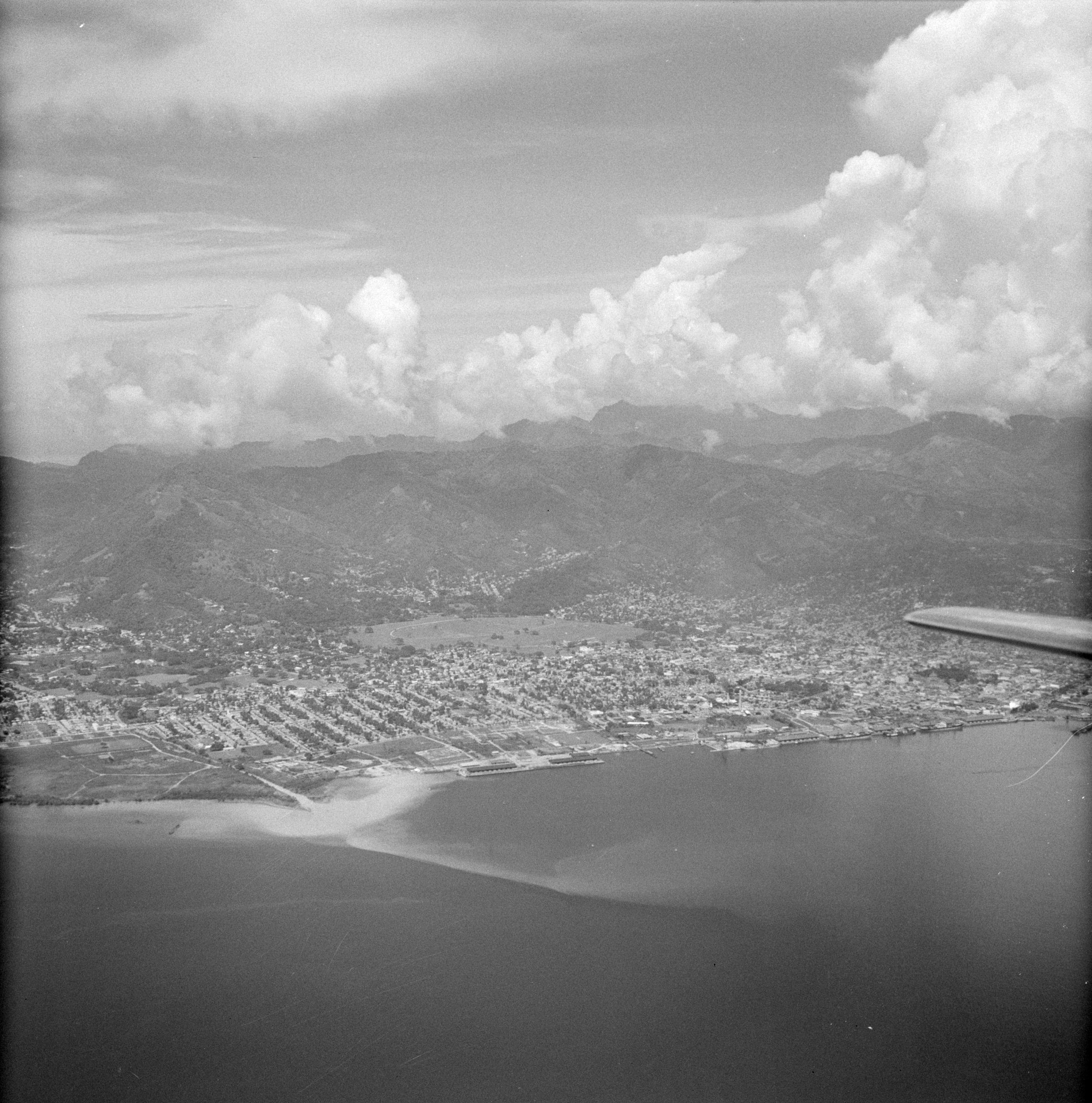 Collectie / Archief : Fotocollectie Van de Poll Reportage / Serie : Nederlandse Antillen en Suriname ten tijde van het koninklijk bezoek van koningin Juliana en prins Bernhard in 1955 Beschrijving : Port of Spain op Trinidad gezien vanuit een vliegtuig Datum : 1 oktober 1955 Locatie : Port of Spain, Trinidad Trefwoorden : luchtfoto's Fotograaf : Poll, Willem van de Auteursrechthebbende : Nationaal Archief Materiaalsoort : Negatief (zwart/wit) Nummer archiefinventaris : bekijk toegang 2.24.14.02 Bestanddeelnummer : 252-2689